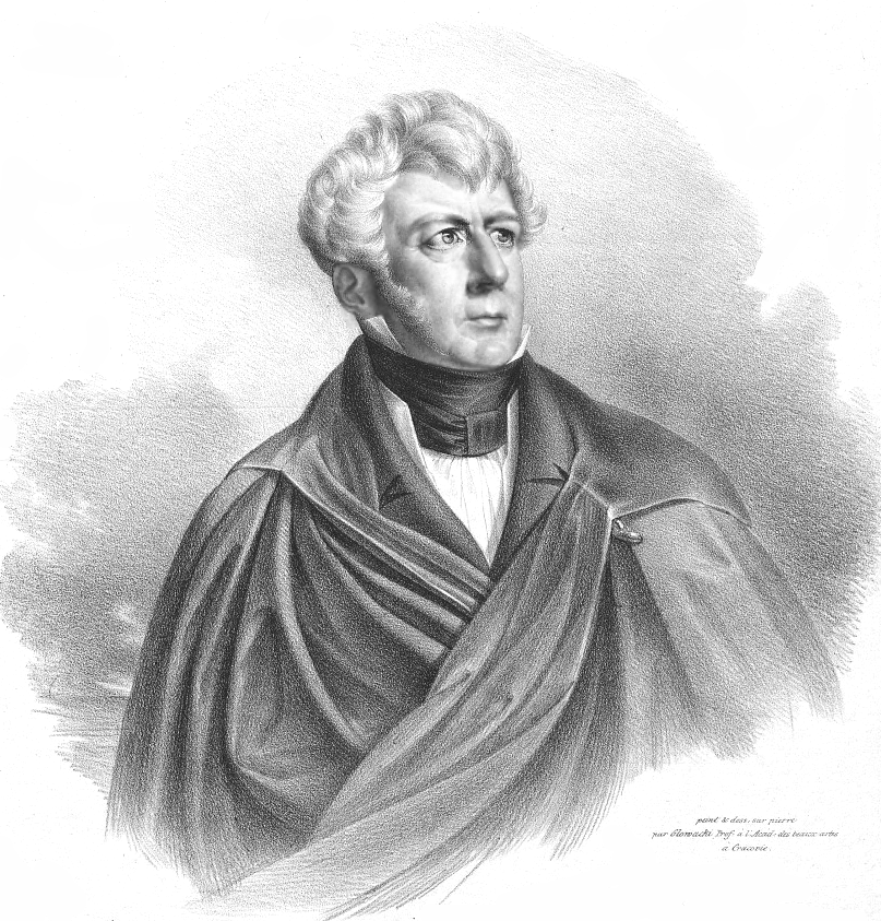 General Józef Chłopicki